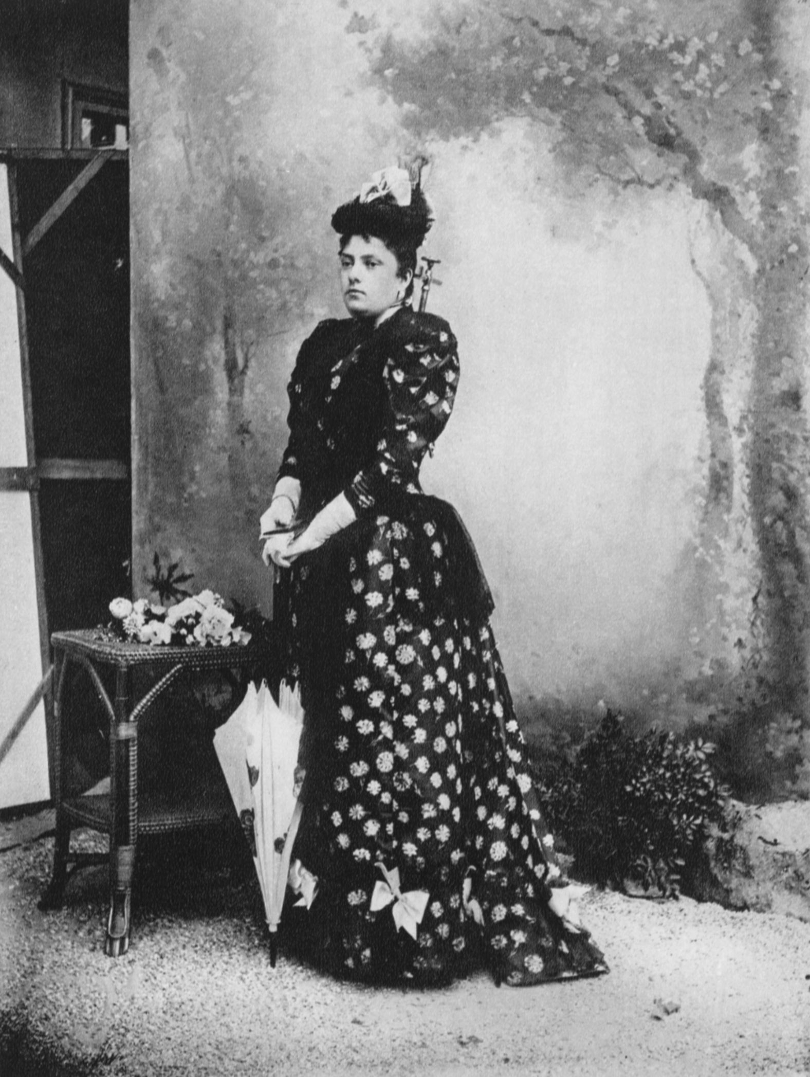 Portraits de Maria Letizia Bonaparte, duchesse d'Aoste (1866-1926), 2ème femme d'Amédée de Savoie, duc d'Aoste, ancien roi d'Espagne.